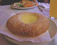 En bild på en öppen krämbulle